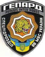 логотип спецпідрозділу МВС Гепард для ілюстрації статті про нього (Гепард (спецпідрозділ))